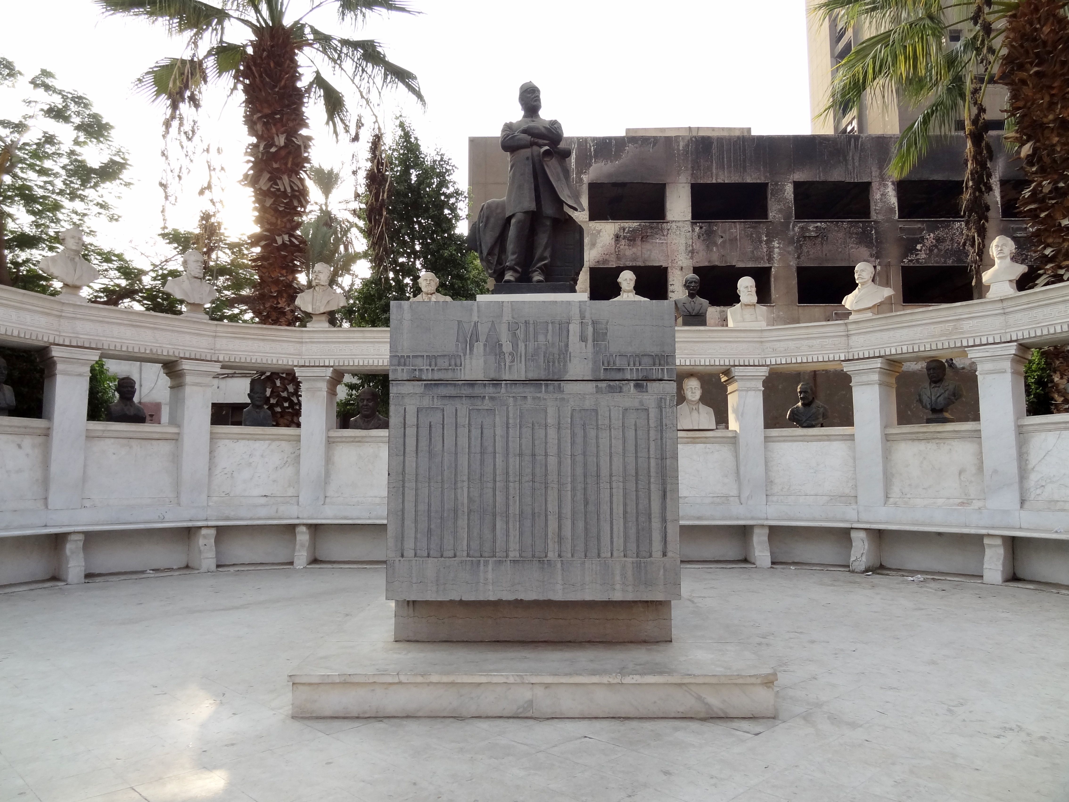 Sarkophag und Denkmal von Auguste Mariette im Garten des Ägyptischen Museums am Tahrir-Platz in Kairo, Ägypten